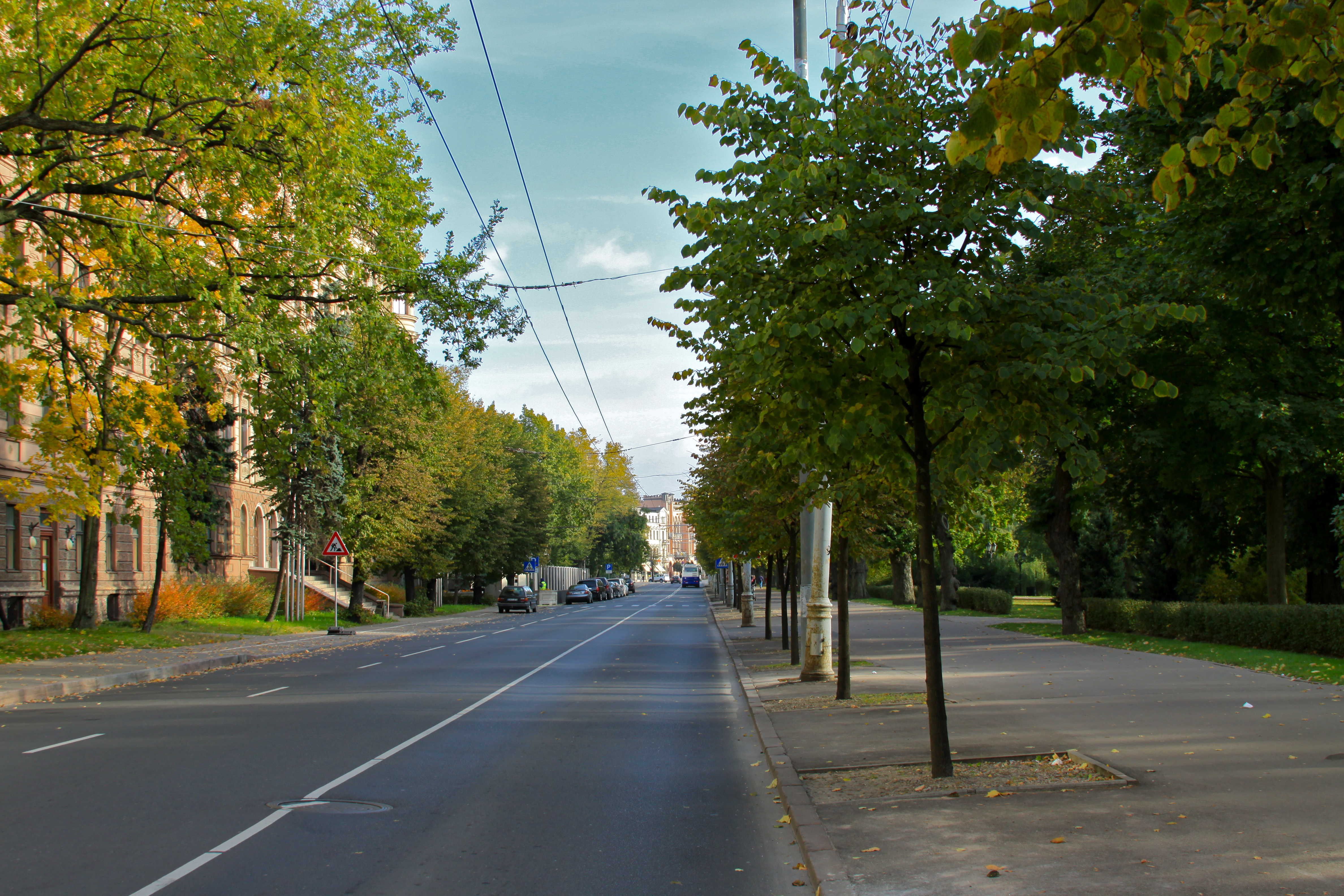 Фото бульвара Райниса в Риге